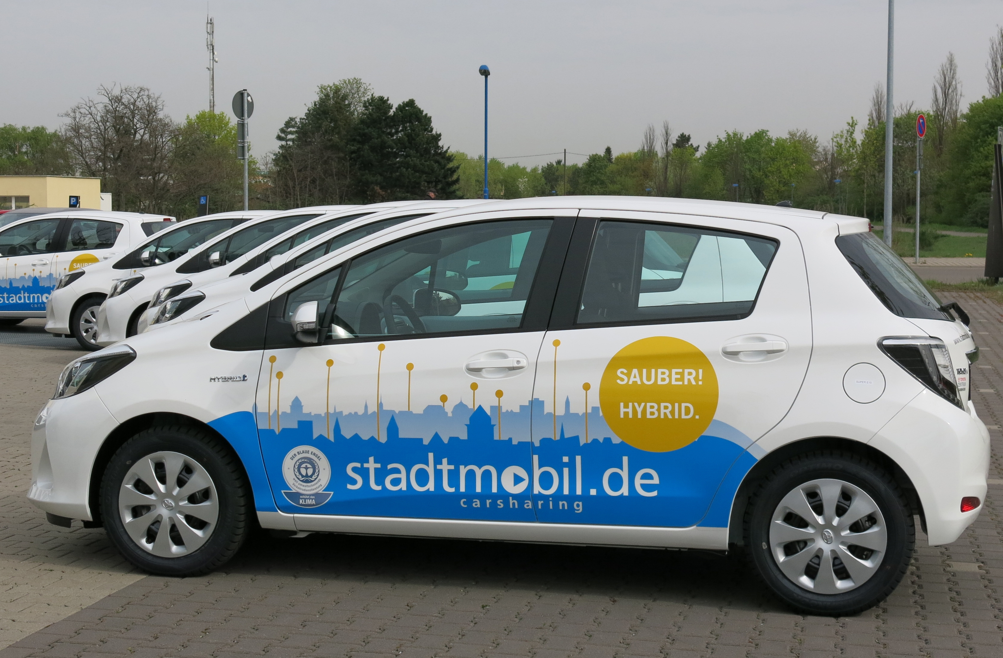 stadtmobil-Hybridfahrzeug